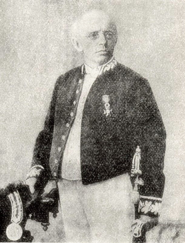 Peter Heinrich Thielen, Sakralmusiker und -komponist